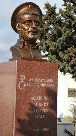 Albert Aqarunovun büstü. (Azərbaycanın Milli Qəhrəmanı)